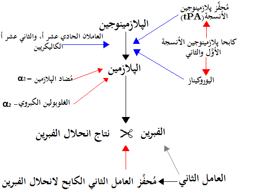 رسمٌ بيانيٌّ يُظهرُ عمليَّة انحلال الفبرين